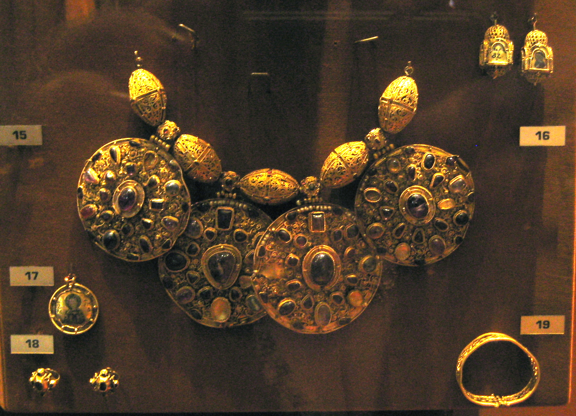 Бармы. Оружейная палата